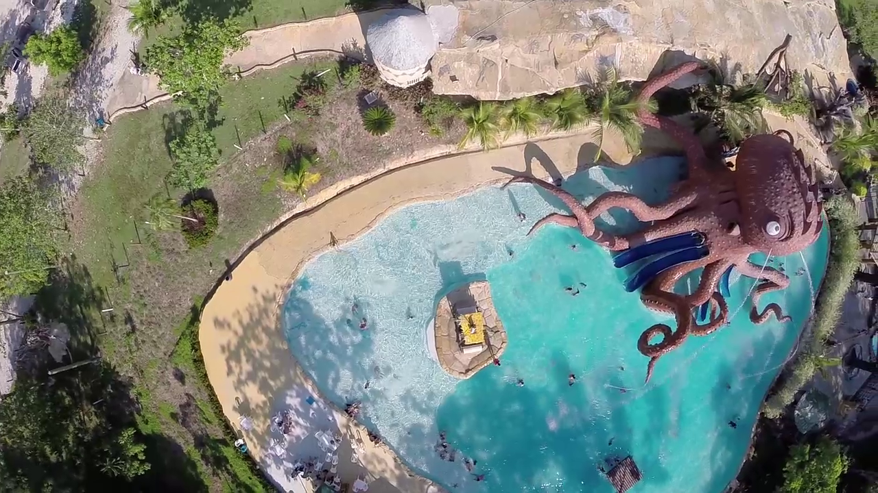 Atracción Octopus del Parque Temático Hacienda Nápoles. Vista aérea.